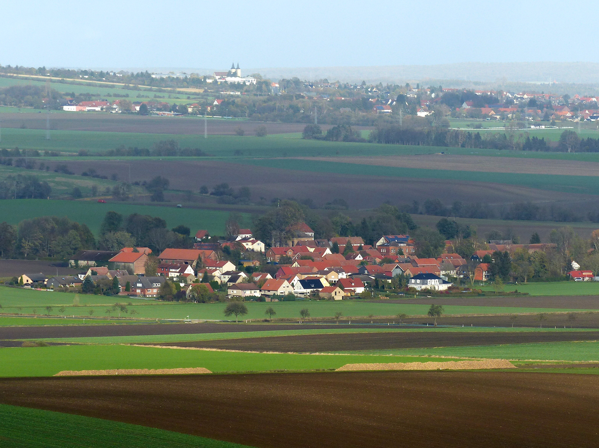 Ausblick auf Dobbeln und Schöningen vom Aussichtsturm Heeseberg.